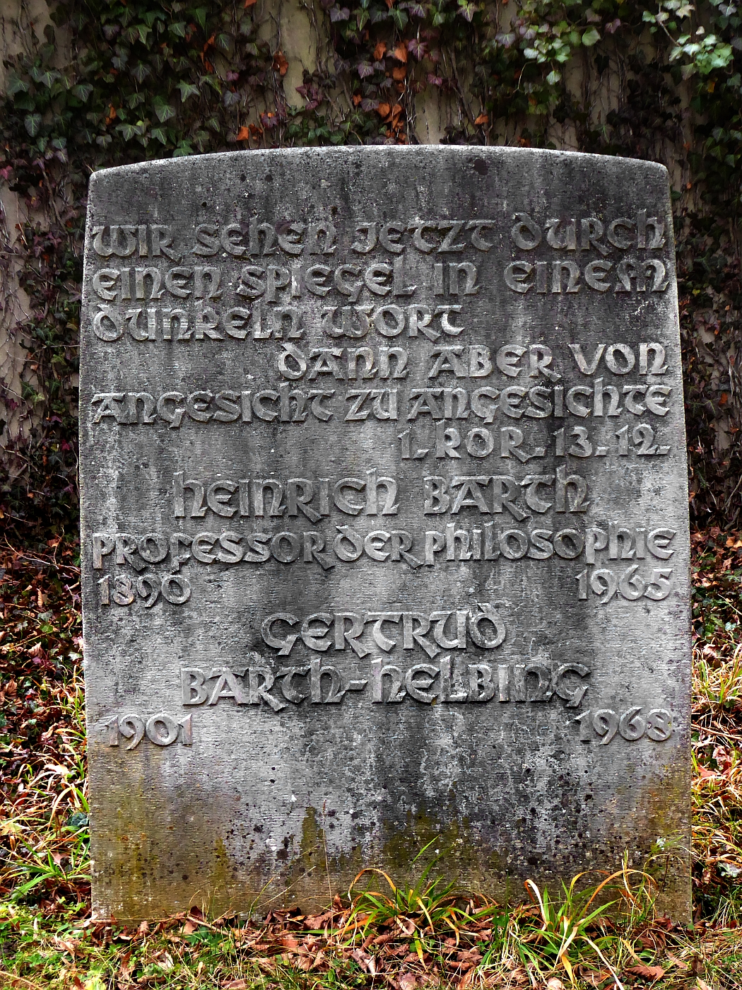 Heinrich Barth-Helbing (1890–1965) Dr.phil., Professor, E.h. der Theologie, Ehrengrab auf dem Friedhof Hörnli, Riehen, Basel-Stad